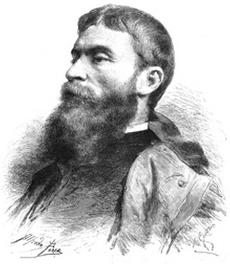 Retrato de Casto Plasencia. Maestro (Cañizar, Guadalajara; 17 de julio de 1846 - Madrid; 18 de mayo de 1890). Practicó la pintura histórica, el retrato, la pintura de costumbres, la pintura decorativa y el gran mural, con una evolución posterior hacia la pintura del natural que le llevaría a crear la colonia artística de Muros dedicada al paisajismo plenairista.